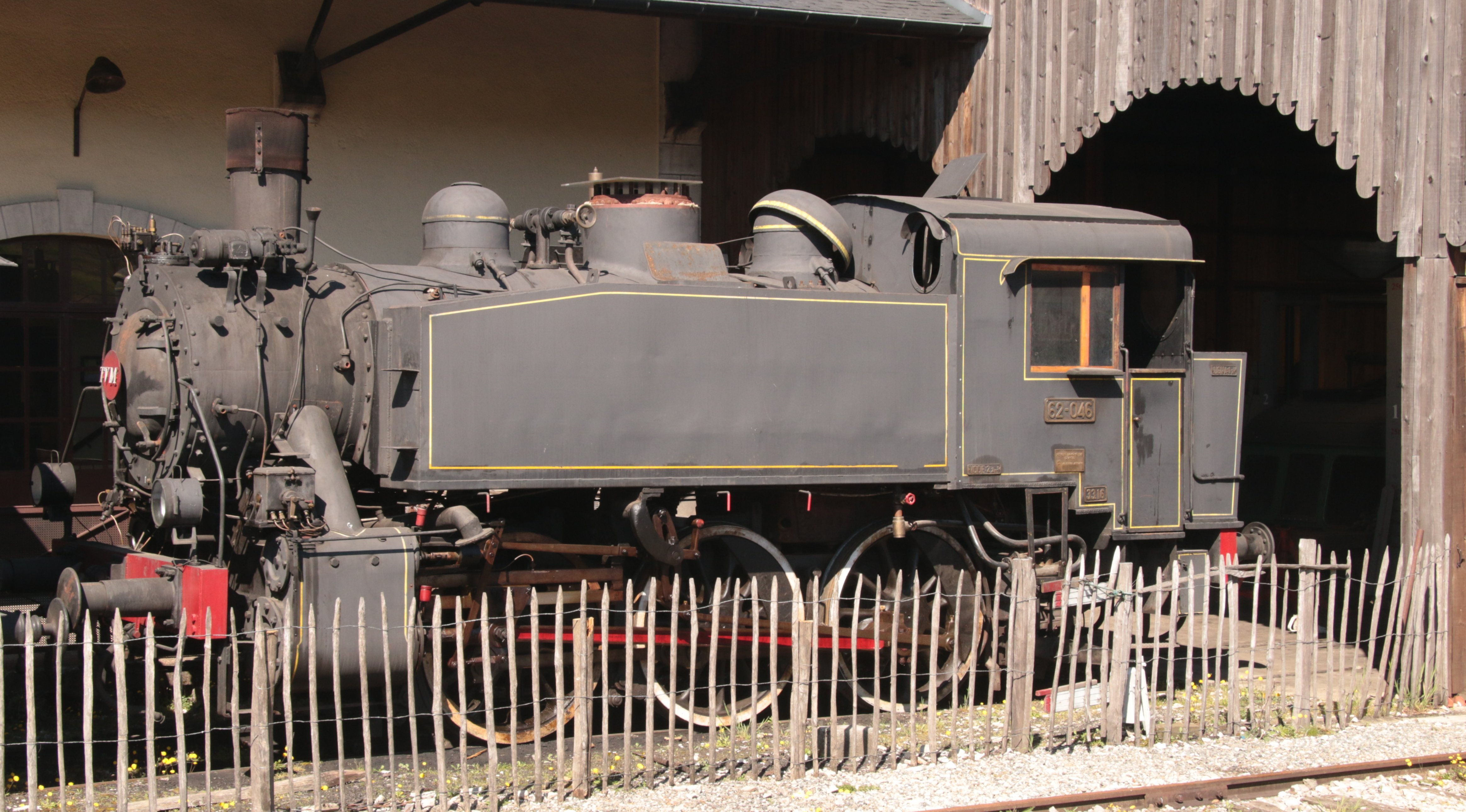 La 030T No. 46 ex-US Army de 1943 lorsqu'elle était sur le Chemin de fer touristique du Haut Quercy.